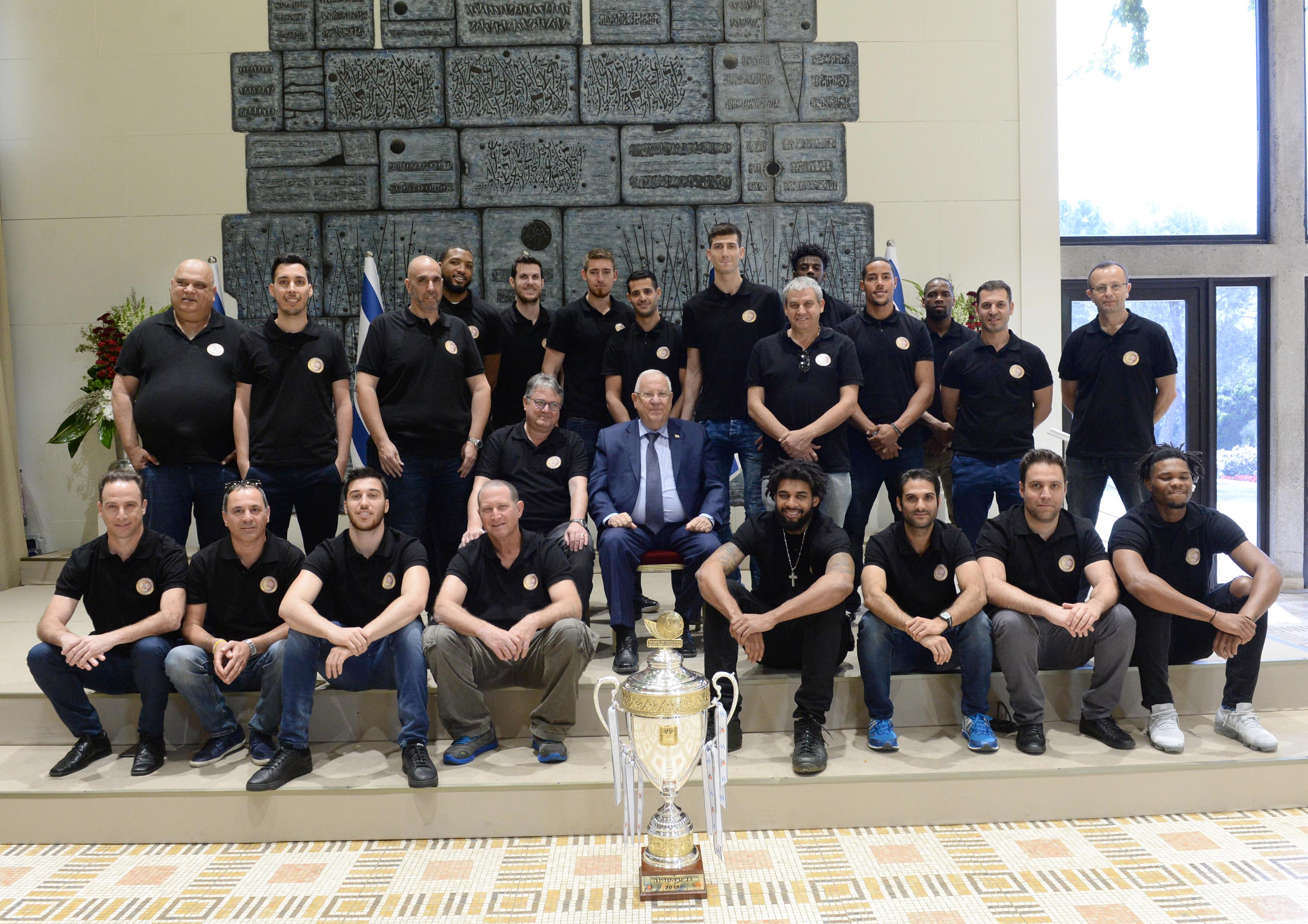 ראובן ריבלין נשיא מדינת ישראל נפגש עם שחקני הפועל חולון לרגל זכייתם בגביע המדינה בכדורסל בעונת 2017/2018